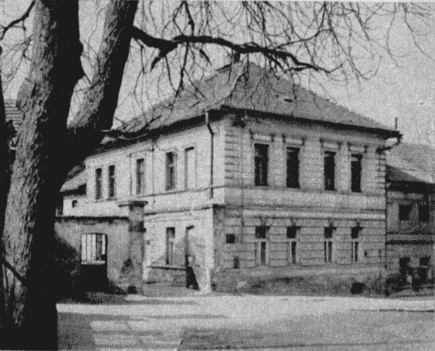 V místech, kde se nyní (2018) na teritoriu Prahy 10 nachází sídliště se za protektorátu (na adrese "Ke Strašnické 13, Praha 10 – Strašnice"; v letech 1940 až 1943 se ulice jmenovala Katteho; německy Kattestrasse) rozkládal statek činovníka strašnického sokola Miloslava Vojtěchovského. Vojtěchovský tady provozoval zámečnickou dílnu a také autoopravnu nákladních přívěsů. Ve statku byl ukryt i archiv strašnické sokolské organizace. V červenci, srpnu a září roku 1941 odtud vysílala radiostanice Sparta I obsluhovaná radiotelegrafisty Otto Linhartem a Jindřichem Klečkou. Také se zde na statku scházeli spolupracovníci Tří králů. Štábní kapitán Václav Morávek zde i několikrát přespal. V zimě a na jaře roku 1942 se v tomto objektu konaly schůzky Jozefa Gabčíka, Jana Kubiše a Josefa Valčíka s Ladislavem Vaňkem, Oldřichem Frolíkem, Karlem Pavlíkem a s dalšími podporovateli parašutistů z řad ilegální odbojové organizace "Jindra".